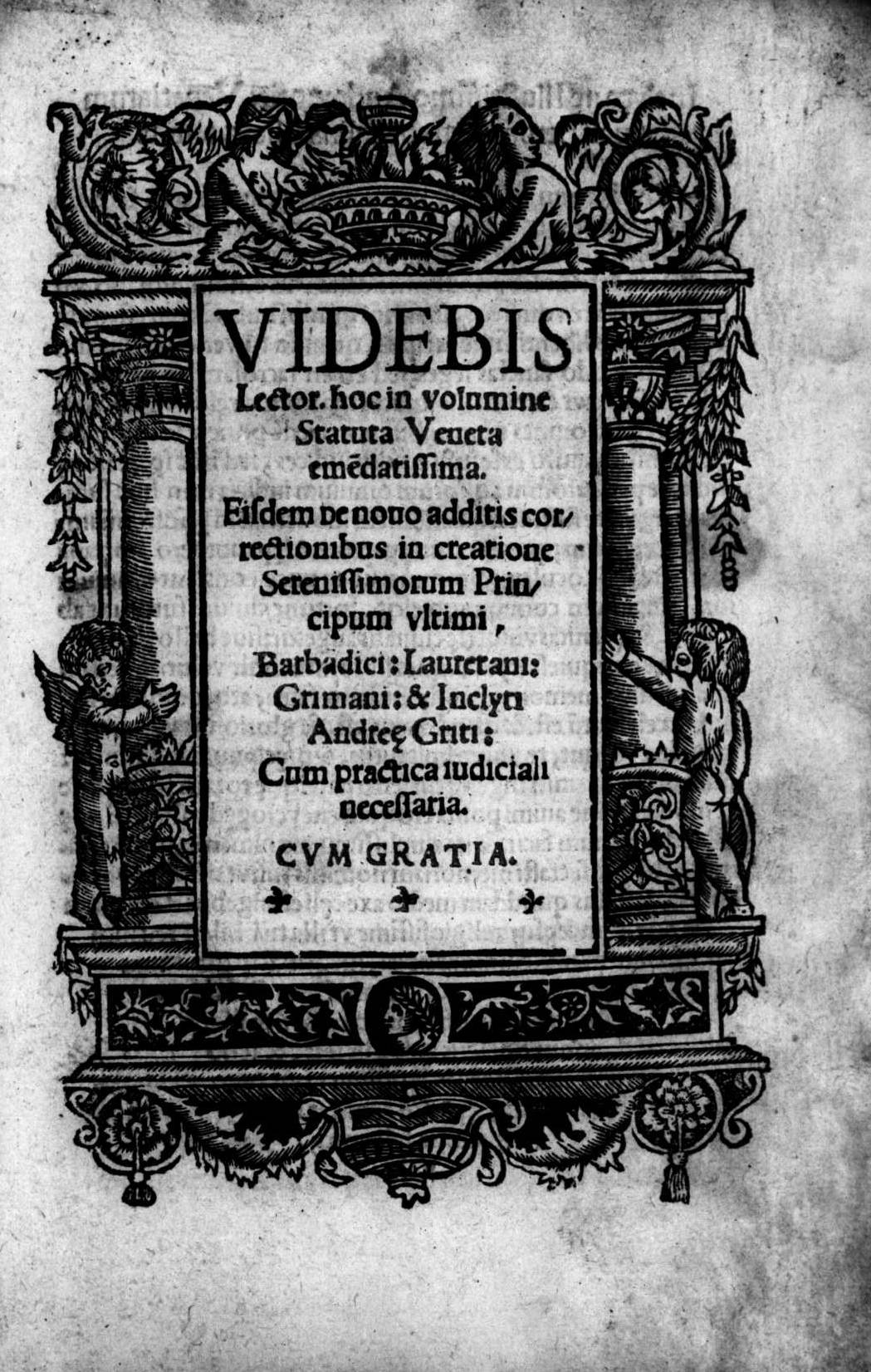 Frontespizio